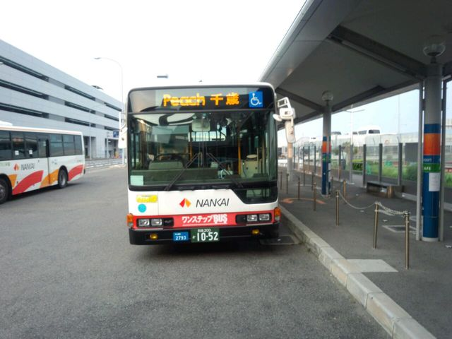 日本初の本格LCCピーチ航空の航空機へ、関空での搭乗時に乗るバス